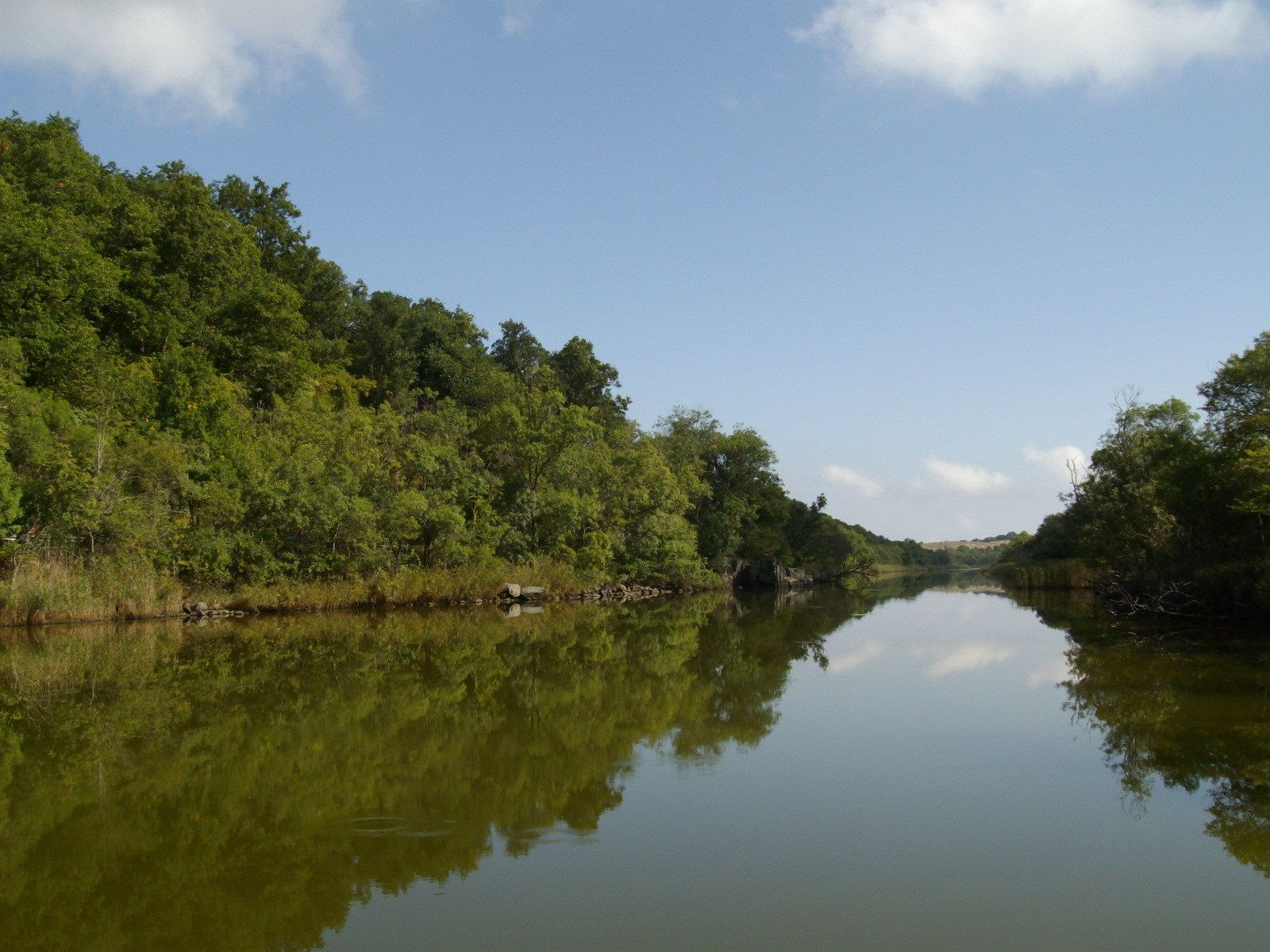 Ропотамо